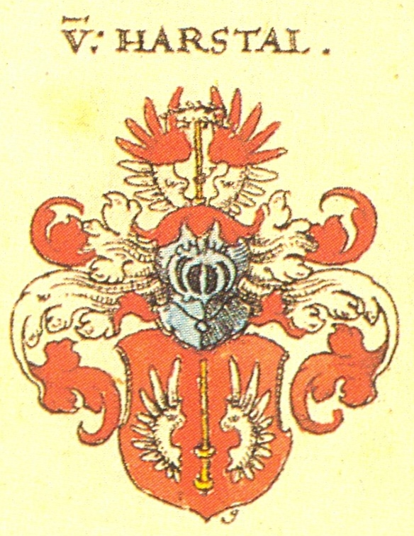 Wappen derer von Harstall in Siebmacher Blatt 141